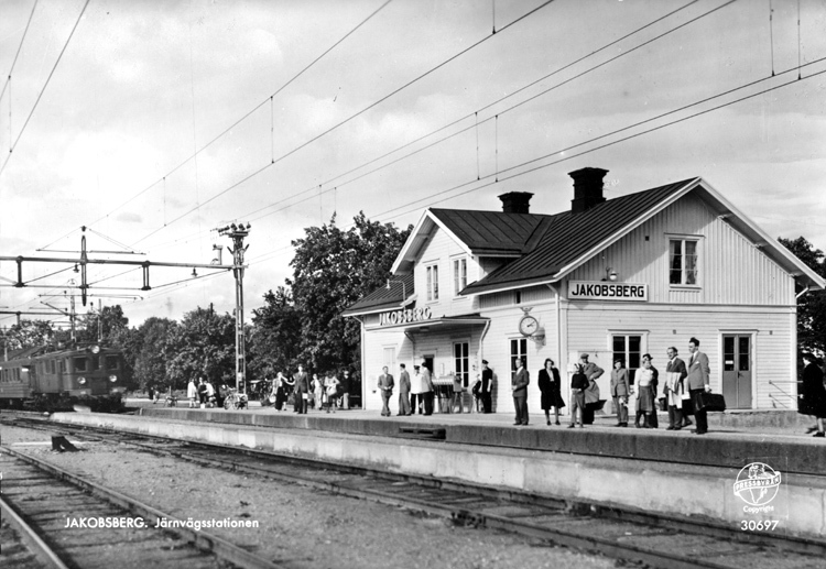 Jakobsbergs järnvägsstation, Järfälla. 2:a fr.h. Karl-Erik Almström, lärare på folkhögskolan. Bilden kan dateras till den tid han var lärare där.